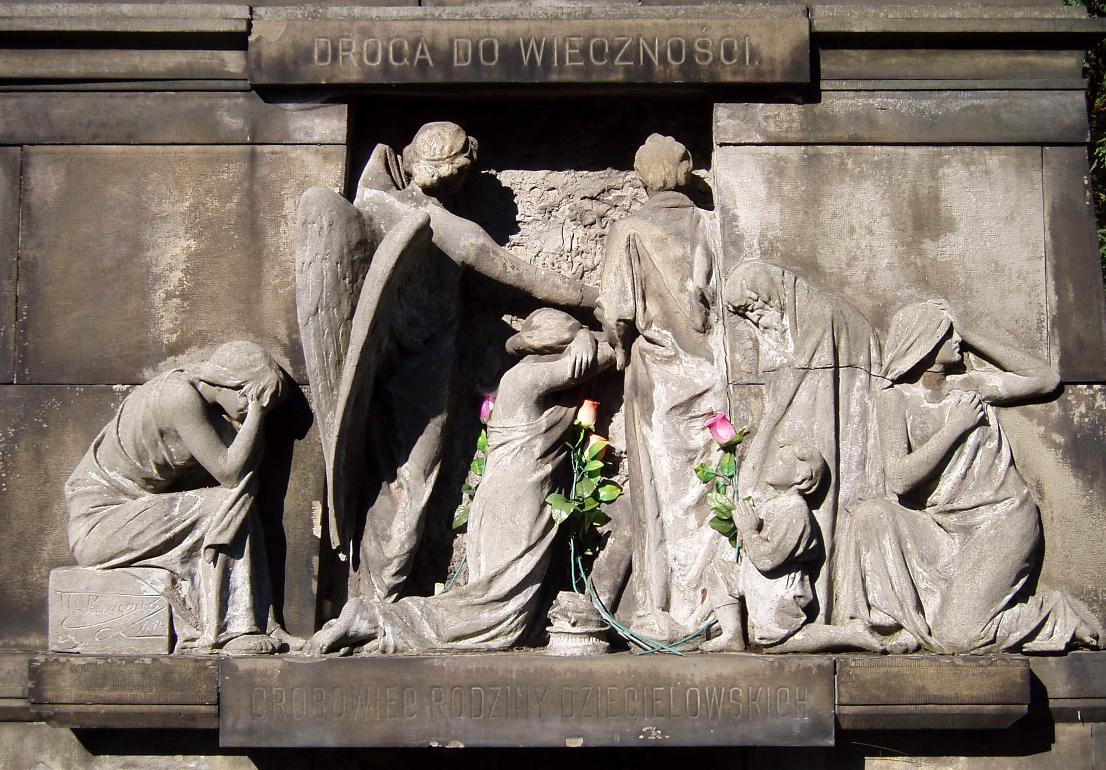 Гробівець родини Дзенцельовських на Янівському цвинтарі у Львові. Скульптор Теобальд Оркасевич (1878—1933).